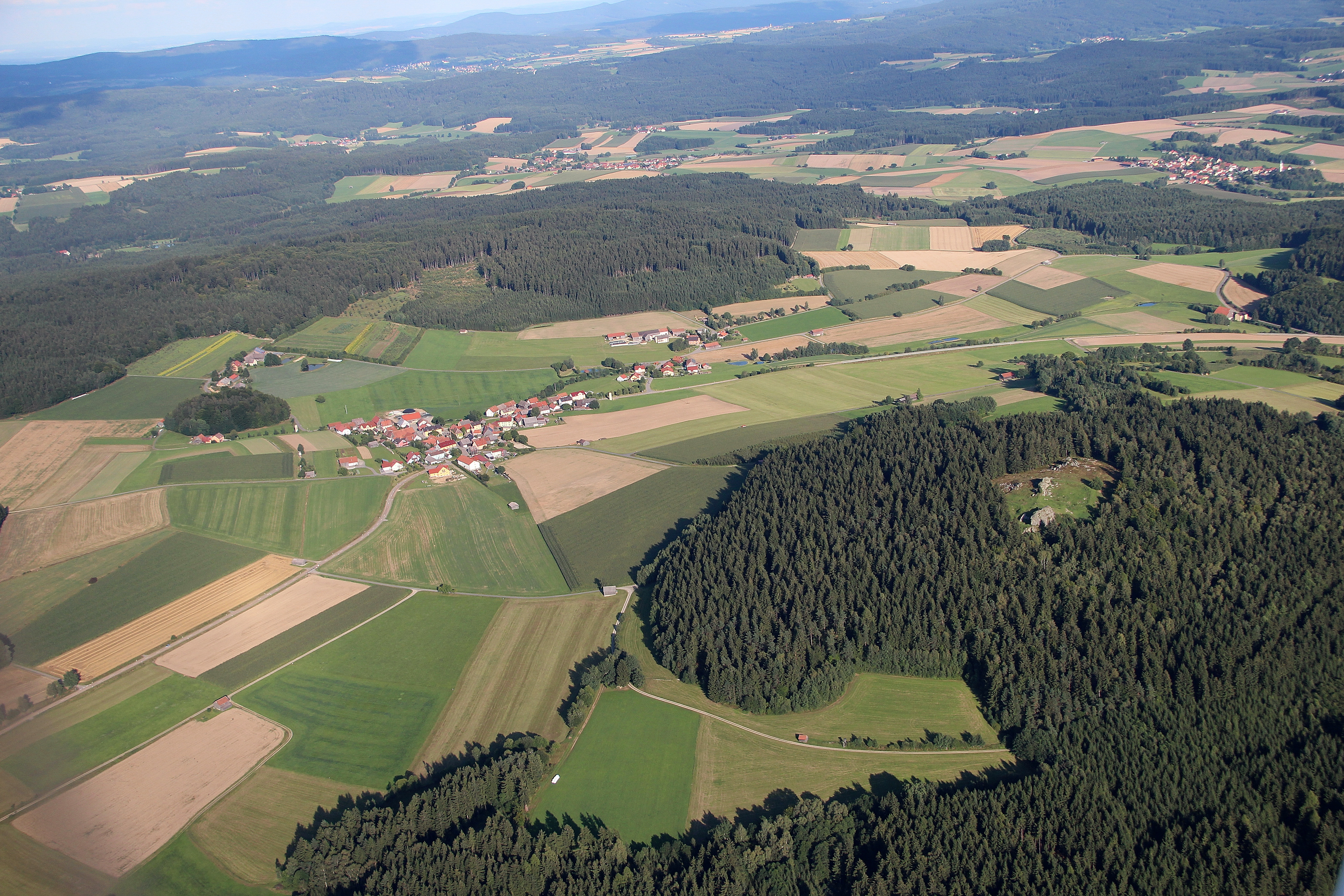 Burgstall Wildstein (rechts) und Ortschaft Wildstein, Gemeinde Teunz, Landkreis Schwandorf, Oberpfalz, Bayern (2012)